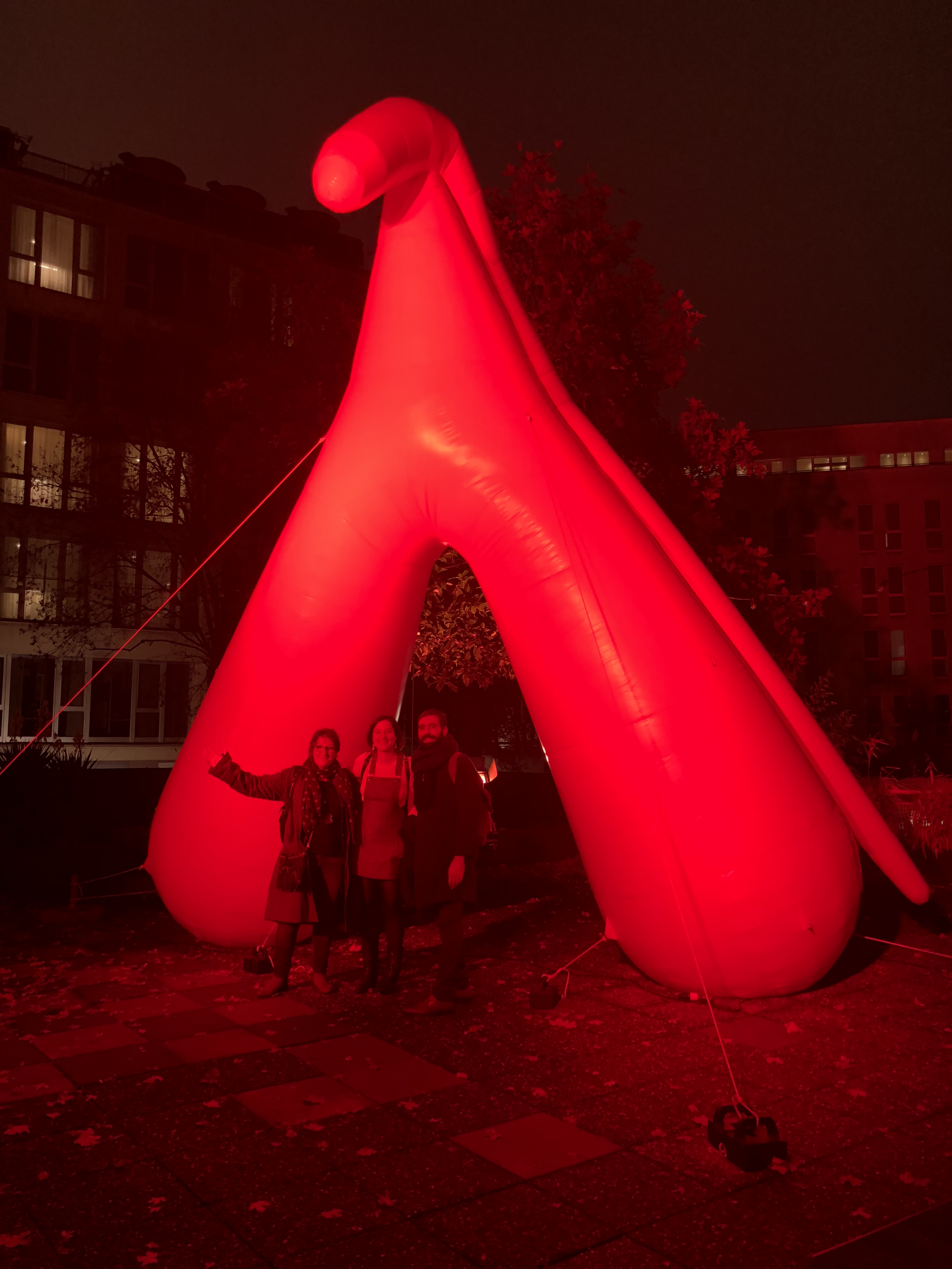 soirée d’ouverture du festival Les Créatives